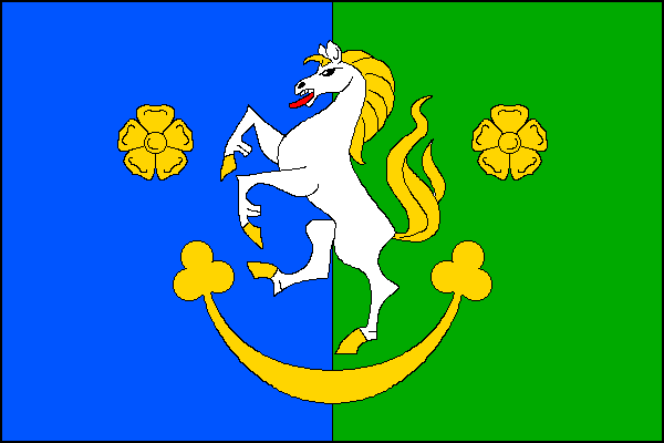 vlajka, Matějov, okres Žďár nad Sázavou